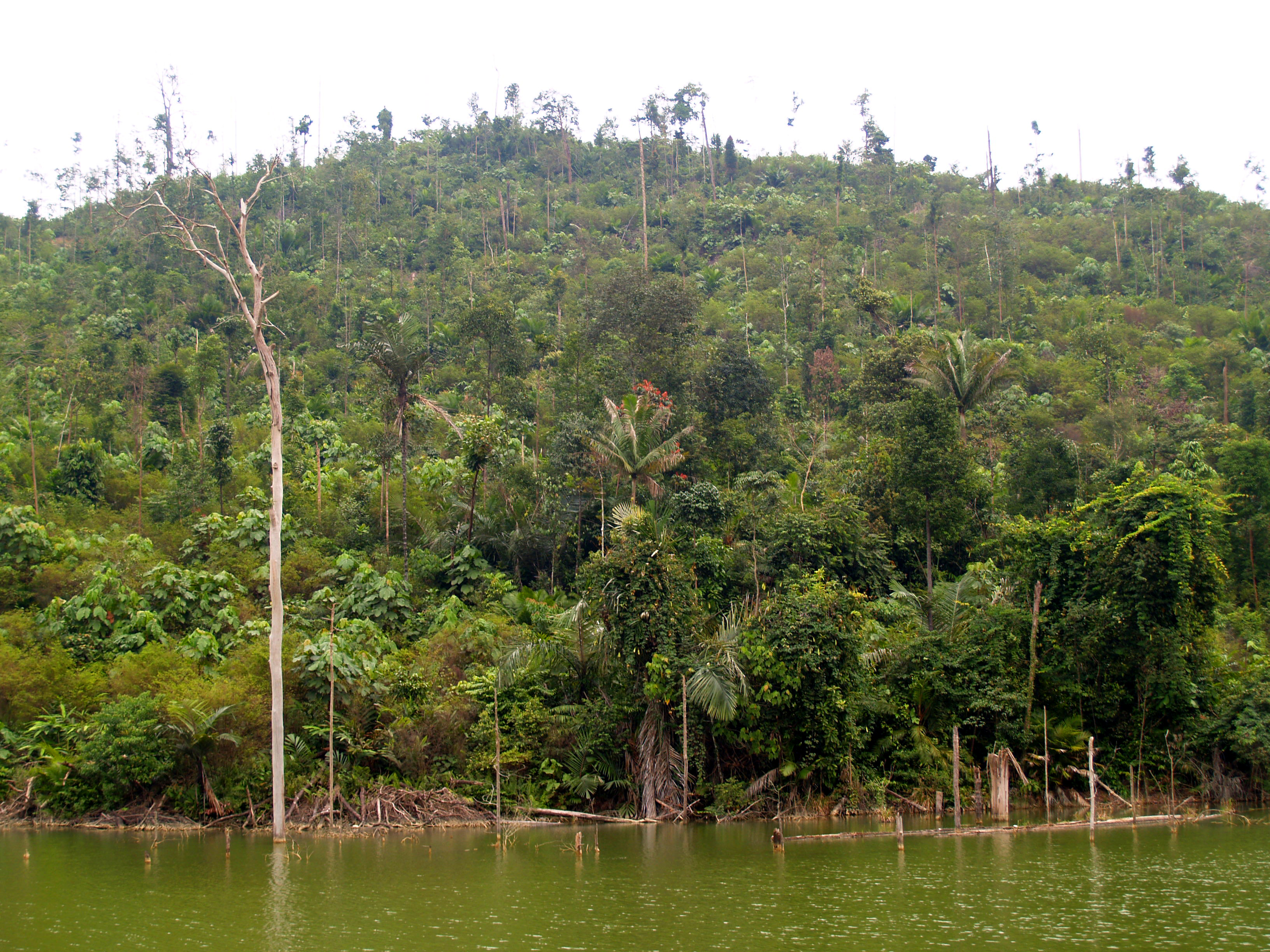 Mancing, Puncak Alam. Bogor, West Java, Indonesia.